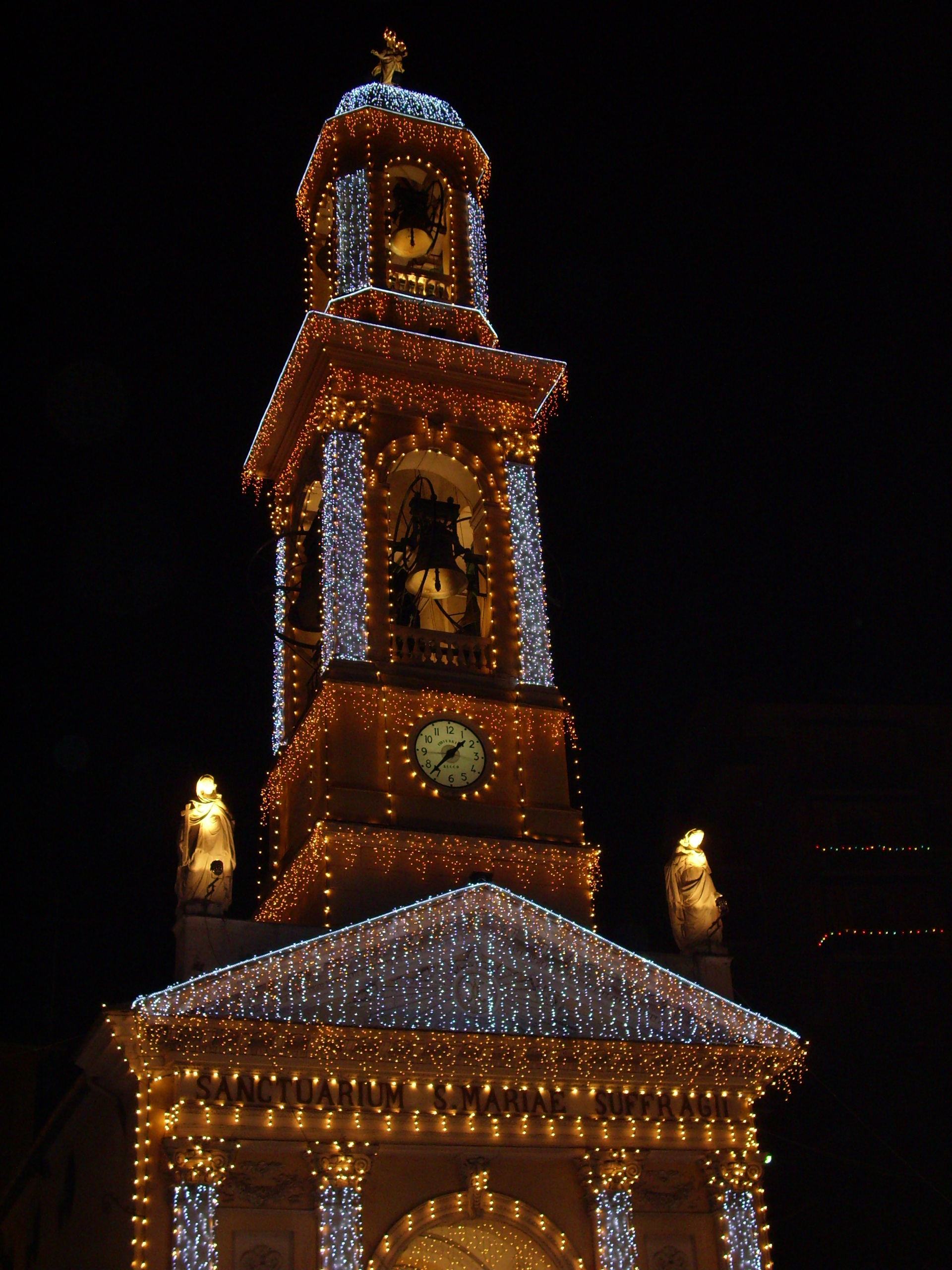 Santuario di Nostra Signora del Suffragio a Recco, con le luminarie per la festa del Fuoco